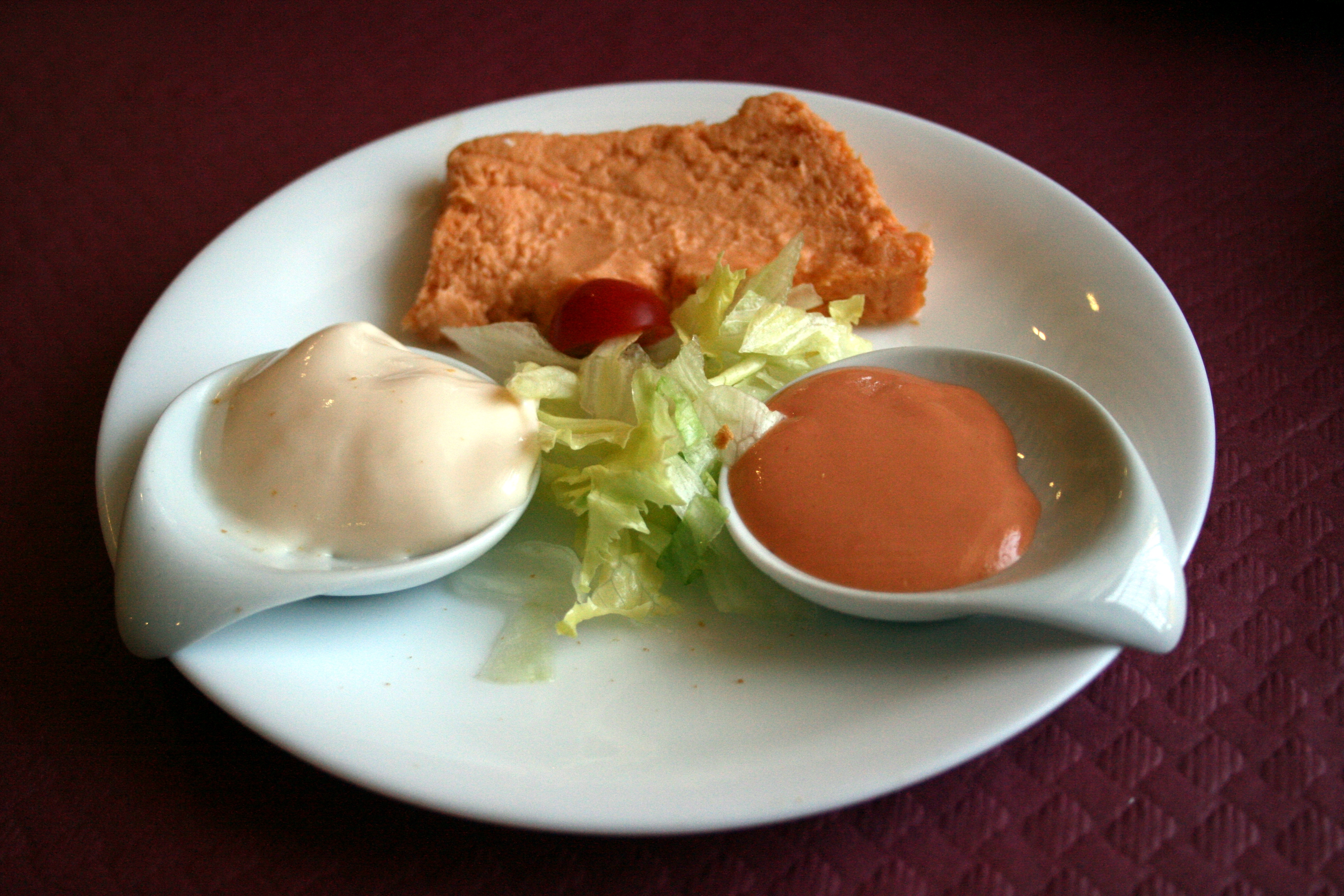 Pastel de cabracho, con dos salsas de acompñamiento (dip)